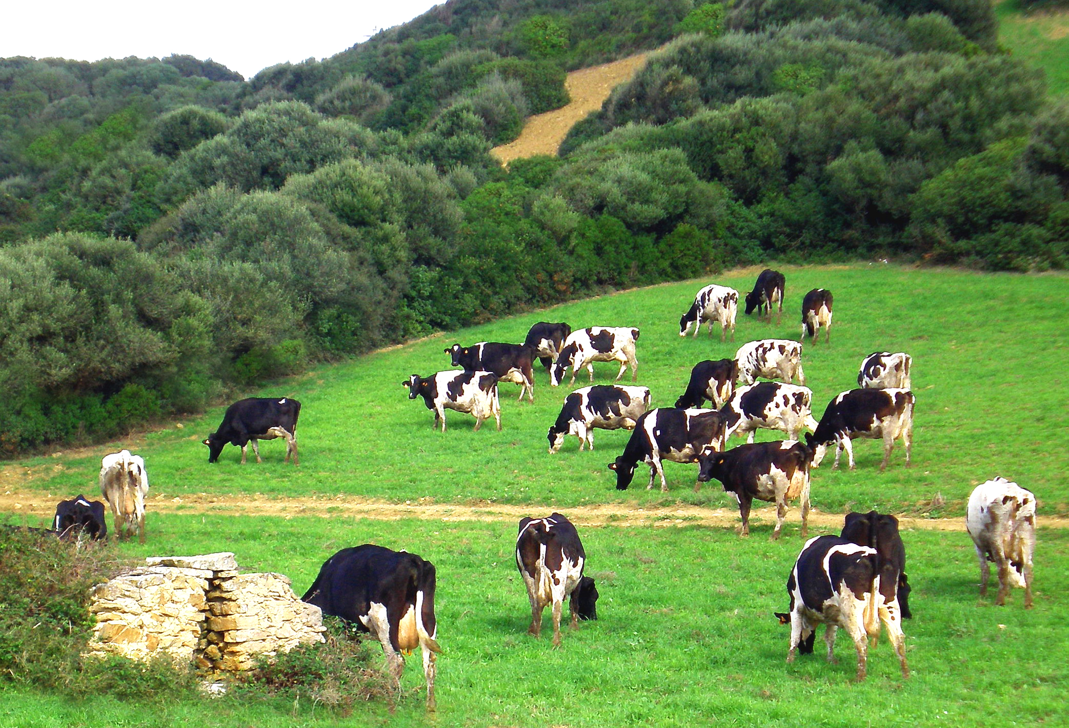 Menorca. Escena campestre en la vertiente oeste del Cerro del Toro